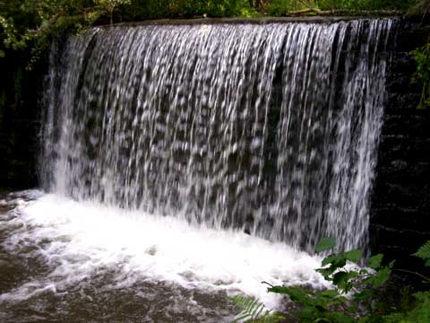 Vlasina (river) near Crna Trava, Serbia/La rivière Vlasina près de Crna Trava, Serbie